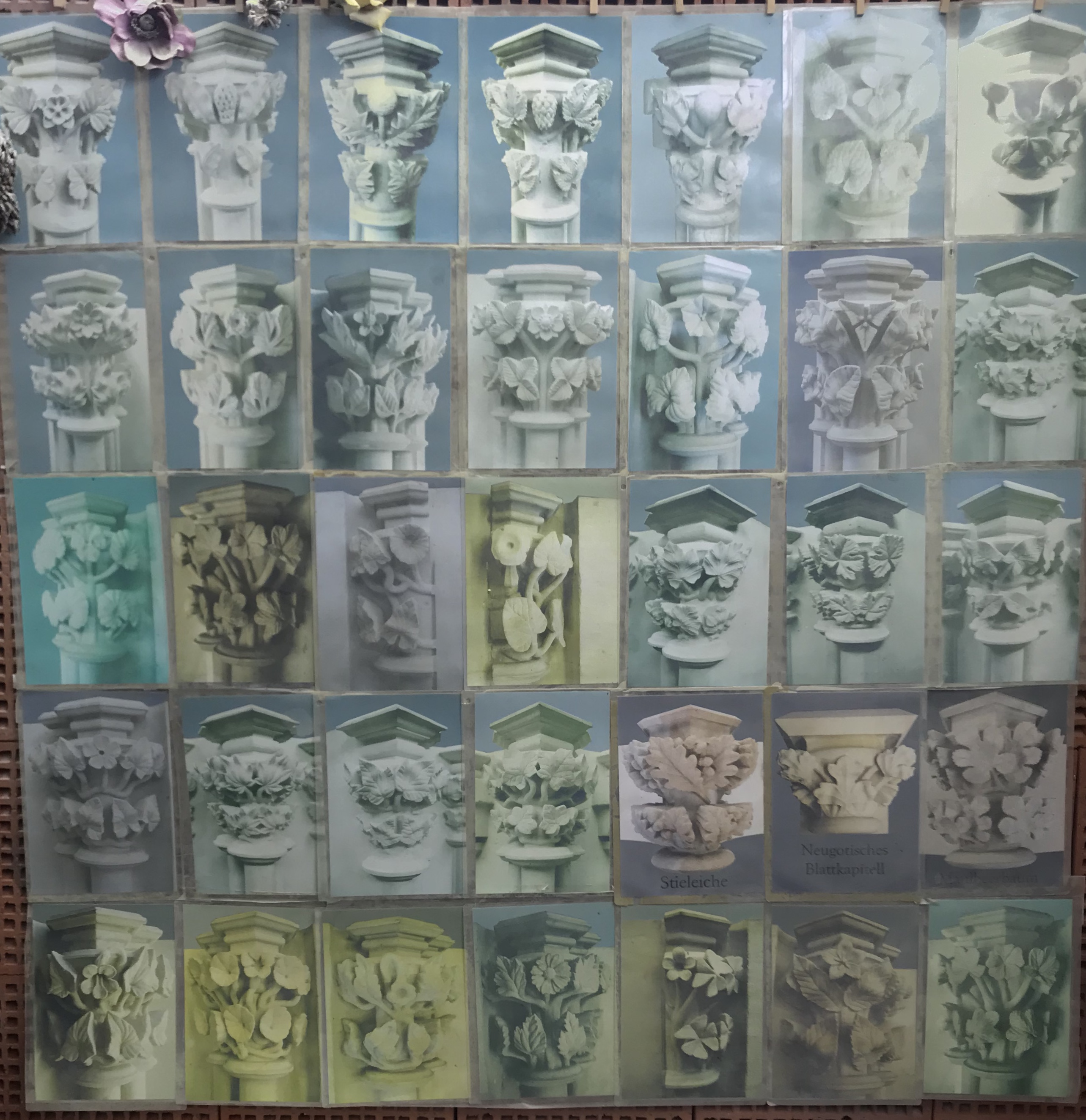 Dombauhütte Köln: Zur Verkleidung der Domplombe schufen die Steinmetzen der Dombauhütte 35 Kapitelle mit modernem Blattwerk in der Kubatur der historischen Formen. Abgebildet sind u.a. Klee, Distel, Schwarzäugige Susanne, Erdbeere, Bouganvillee